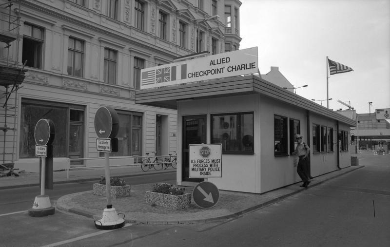 Juni 1988 Berlin (West), Grenzübergang Checkpoint Charlie, Bezirk Kreuzberg